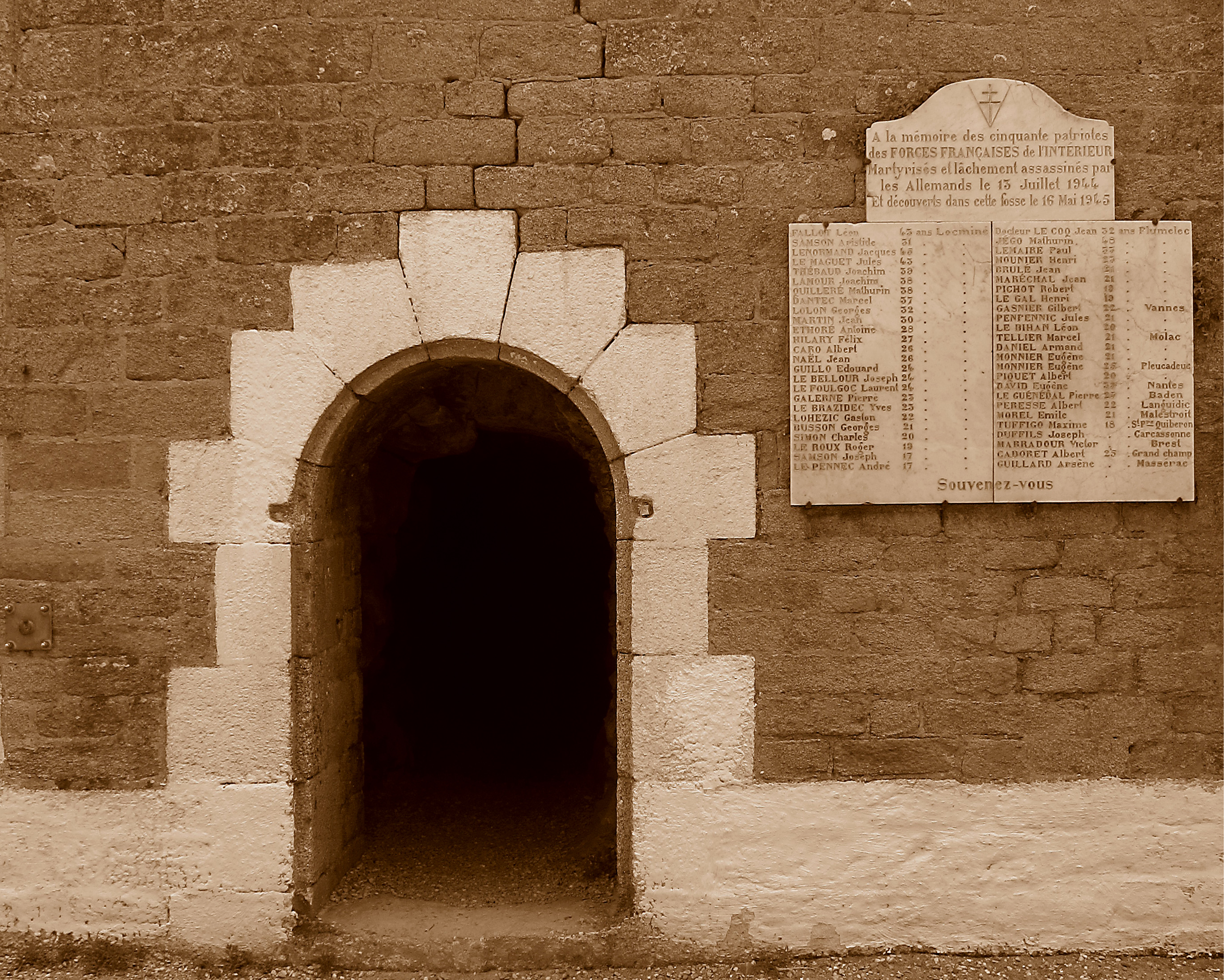 Saint-Pierre-Quiberon (Morbihan, France) : Entrée du tunnel du monument aux morts du Fort de Penthièvre.